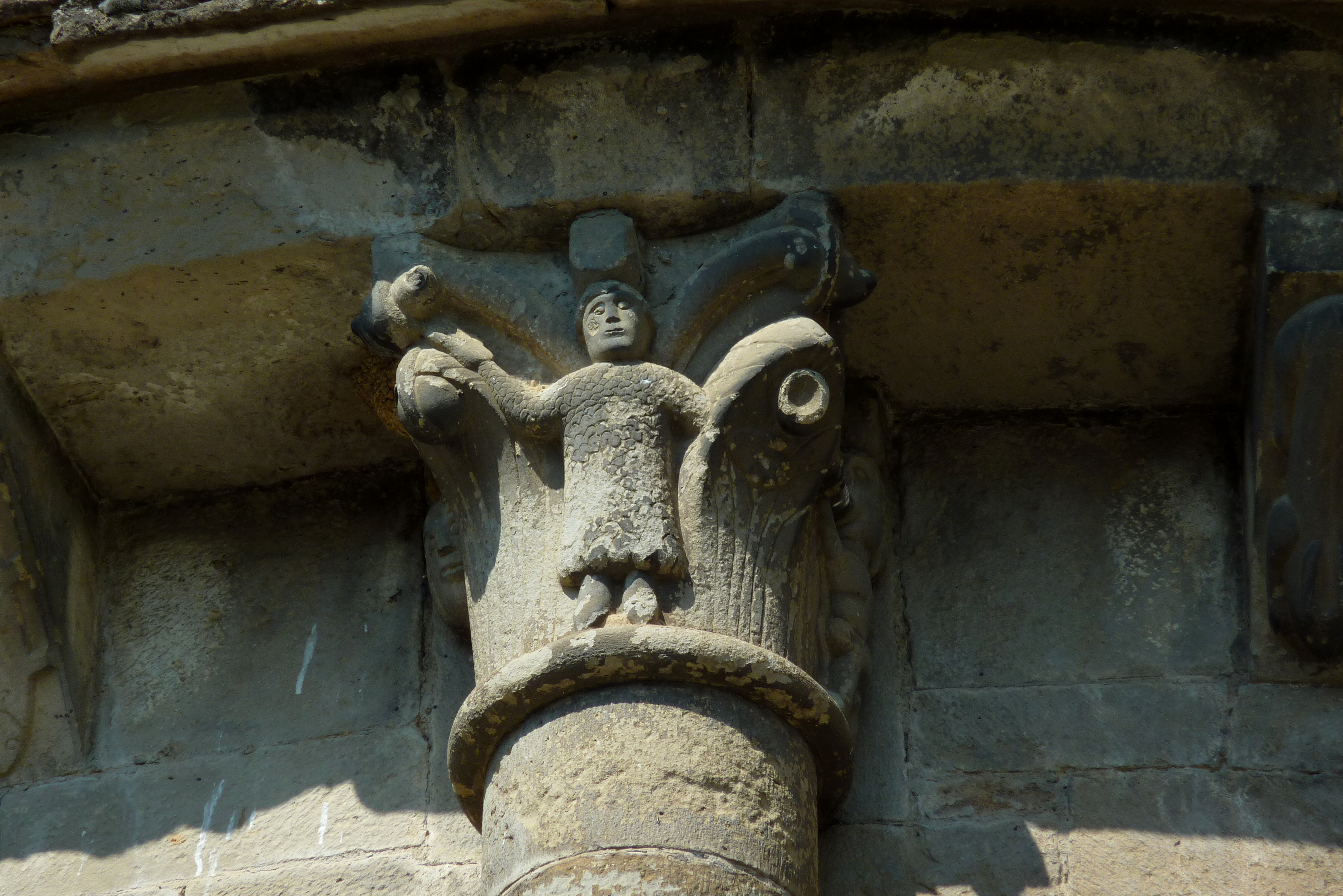 Pfarrkirche und ehemalige Klosterkirche Santa María in Santa Cruz de la Serós in der Provinz Huesca (Aragón/Spanien), Kapitell der Apsis